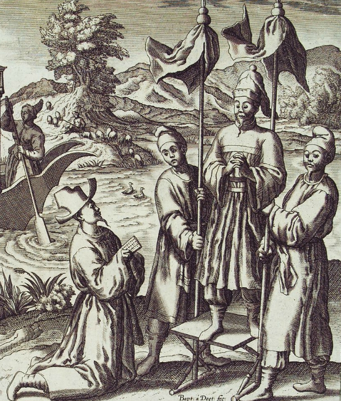 Ein chinesischer Mandarin erhält eine Petition (Ausschnitt aus einer größeren Grafik)